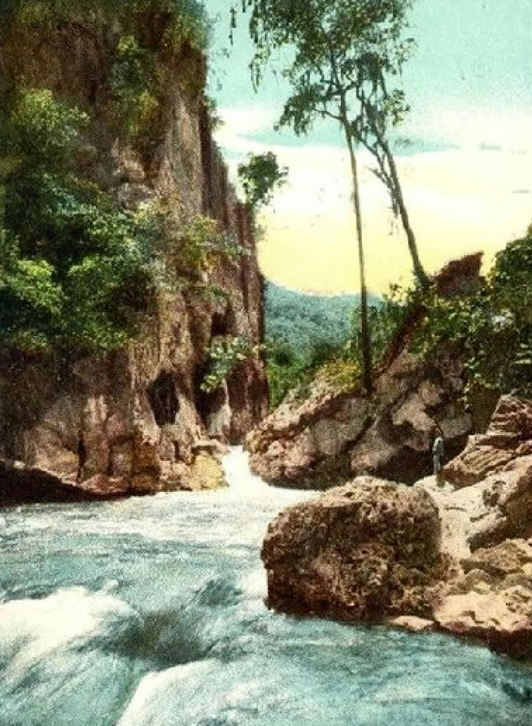 Cañón del río Guaire y Pared este del Peñon de Guacas o Carraos, en el municipio El Hatillo, estado Miranda - Venezuela